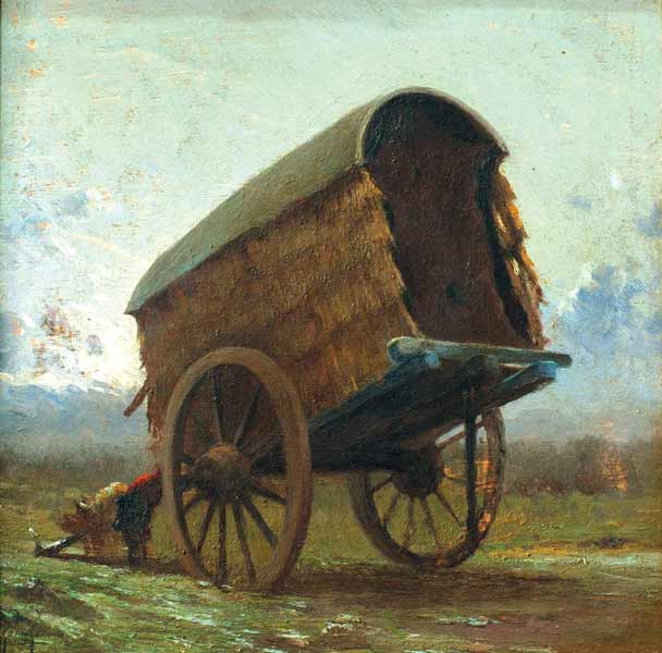 Obra del pintor uruguayo Ernesto Laroche (1879-1940) "La carreta", óleo sobre tabla de 20 x 19,5 cm.